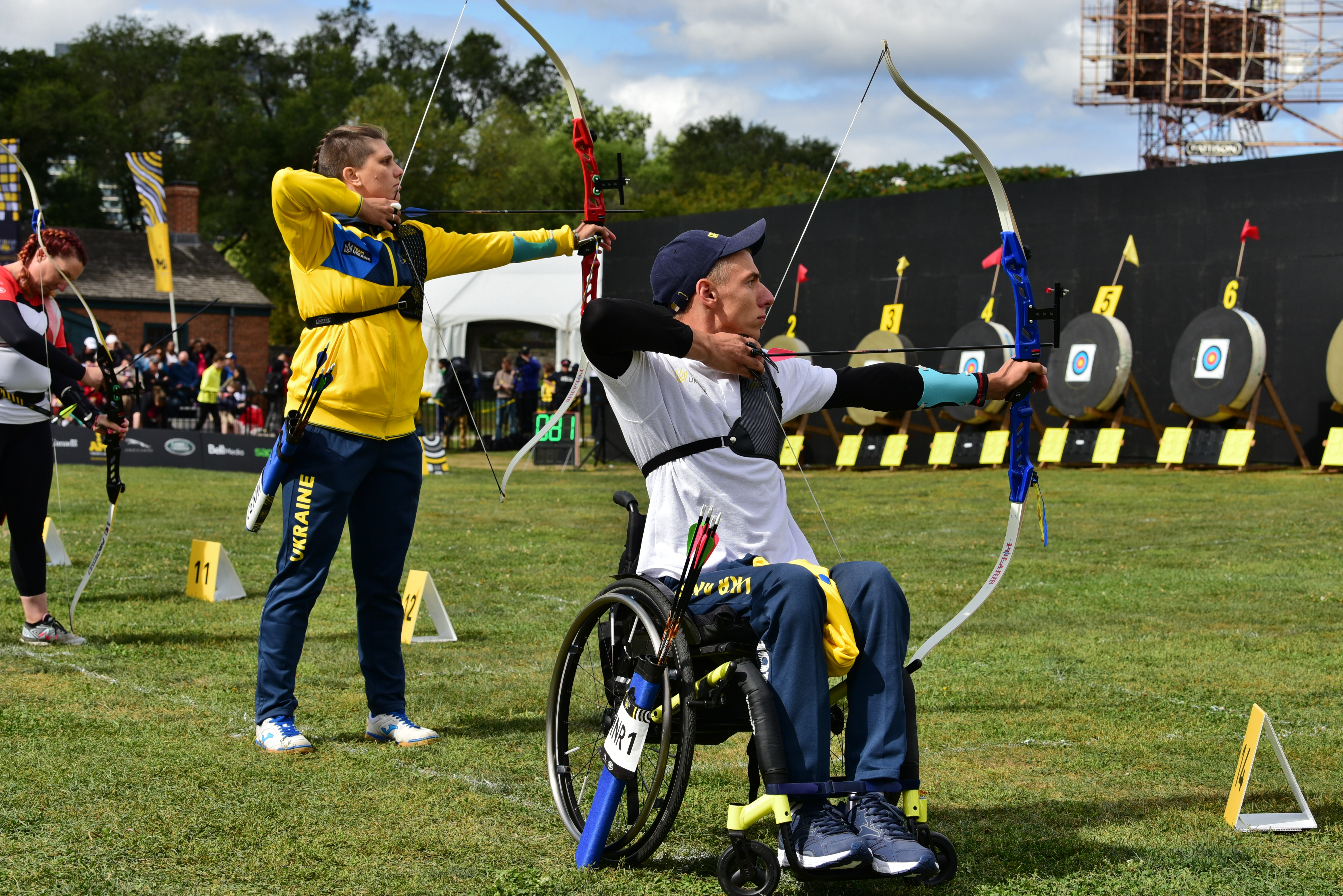 Катерина Михайлова та Роман Панченко на змаганнях зі стрільби з лука під час Ігор нескорених у Торонто 2017